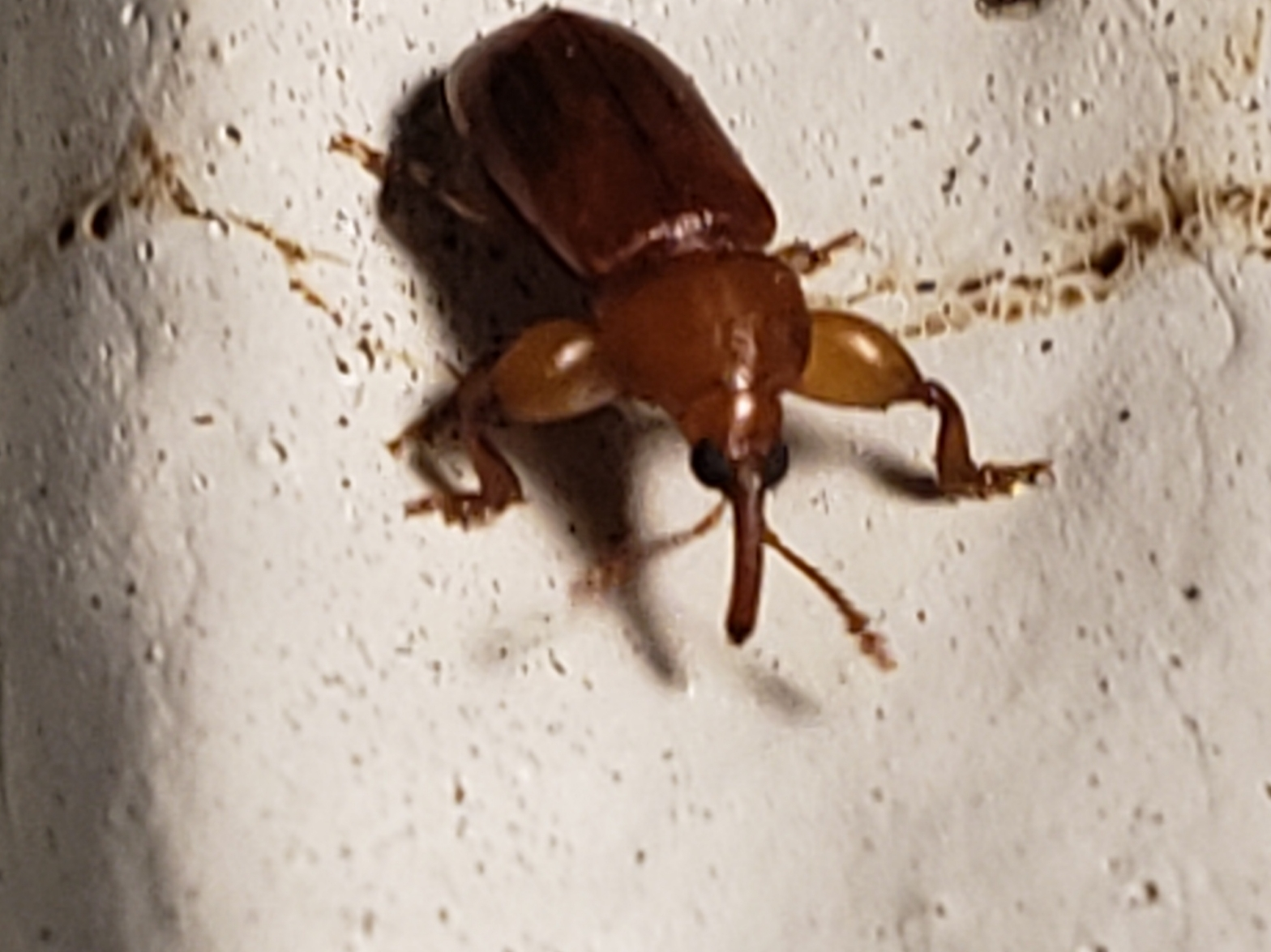 Rhopalotria mollis